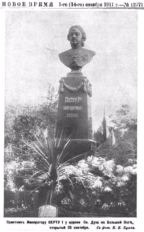 Памятник Петру I у церкви Святого Духа на Большой Охте